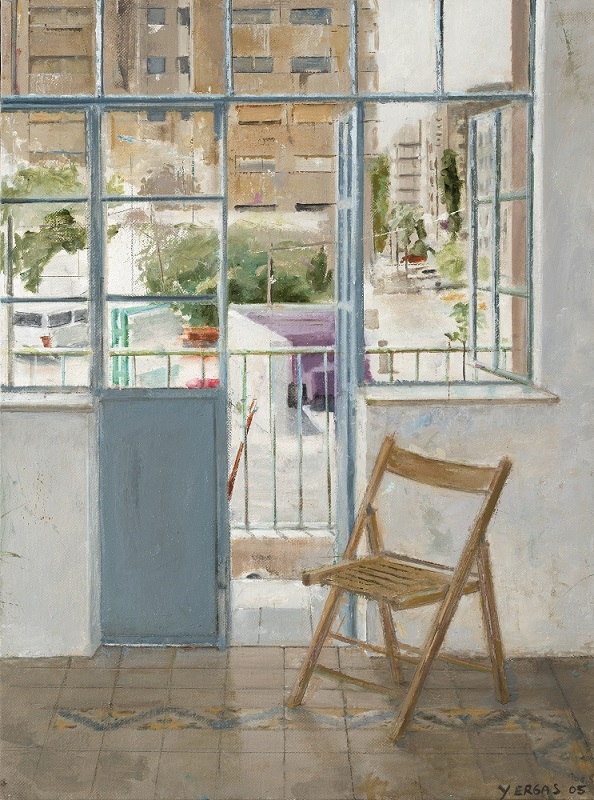 אגריפס 12, 2005 שמן על בד, גובה 54סמ', אוסף פרטי